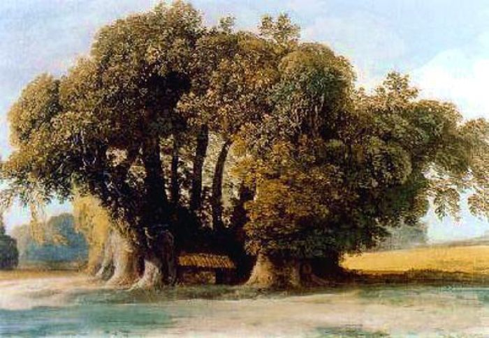 Il Castagno dei Cento Cavalli nel secolo XVIII, ritratto da Jean Houel (1735-1813).